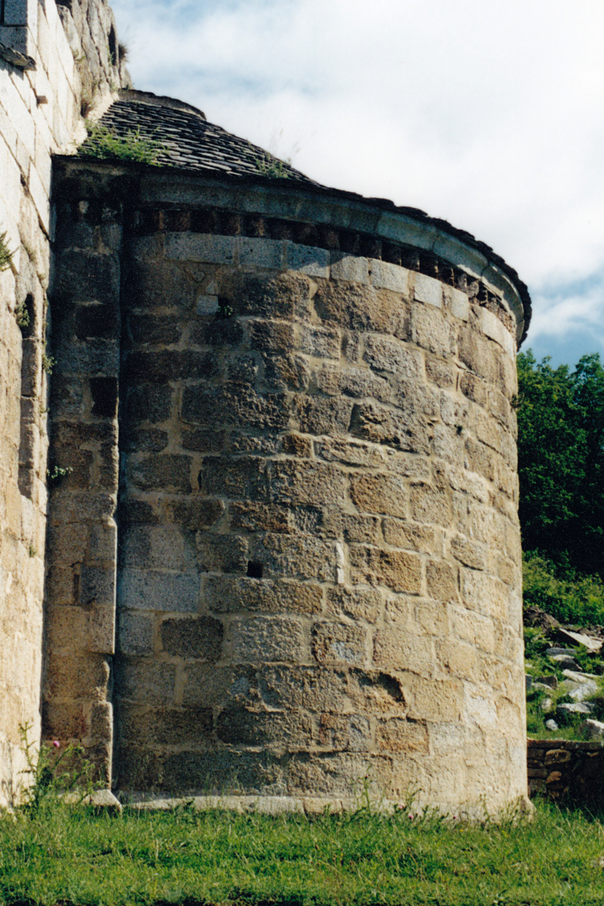 France - Pyrénées Orientales - Vallespir - Église Saint-Martin de Corsavy